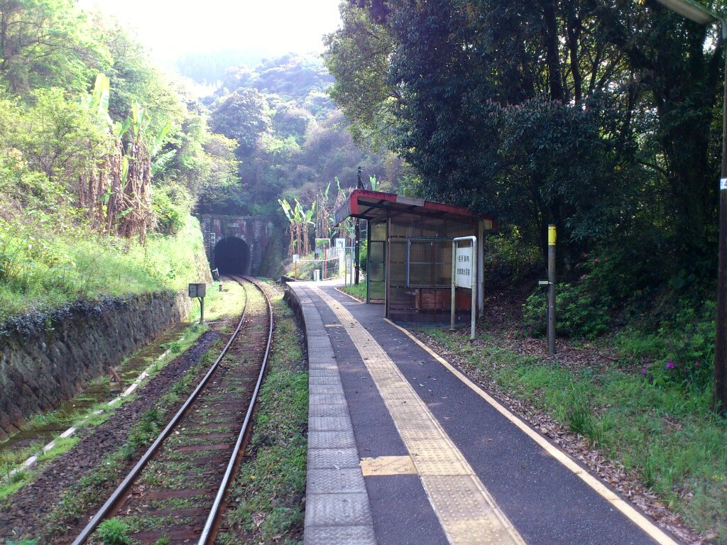 JR九州の三角線赤瀬駅の様子です。２００６年撮影時と比較すると、待合スペースが補修され綺麗になっていました。